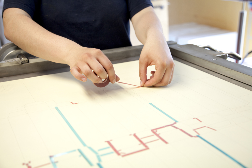 Packmitteltechnologe/-in